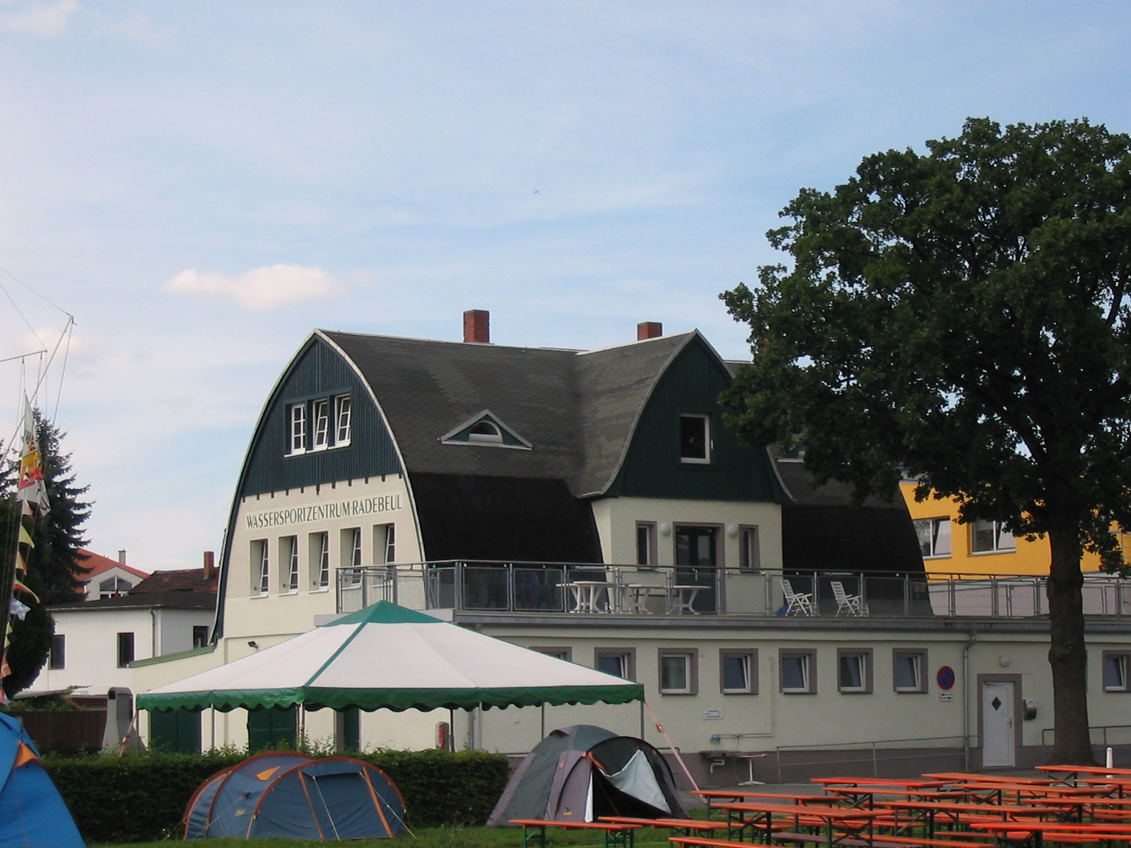 Bootshaus